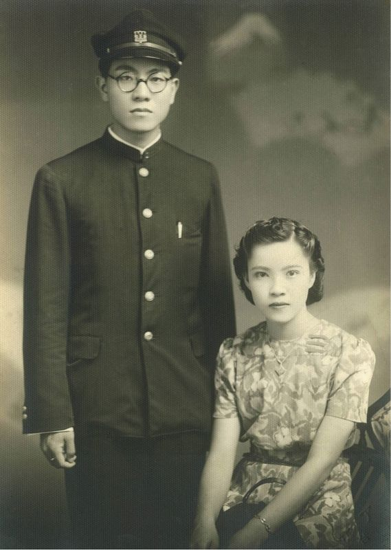 王育霖與陳仙槎的訂婚寫真。